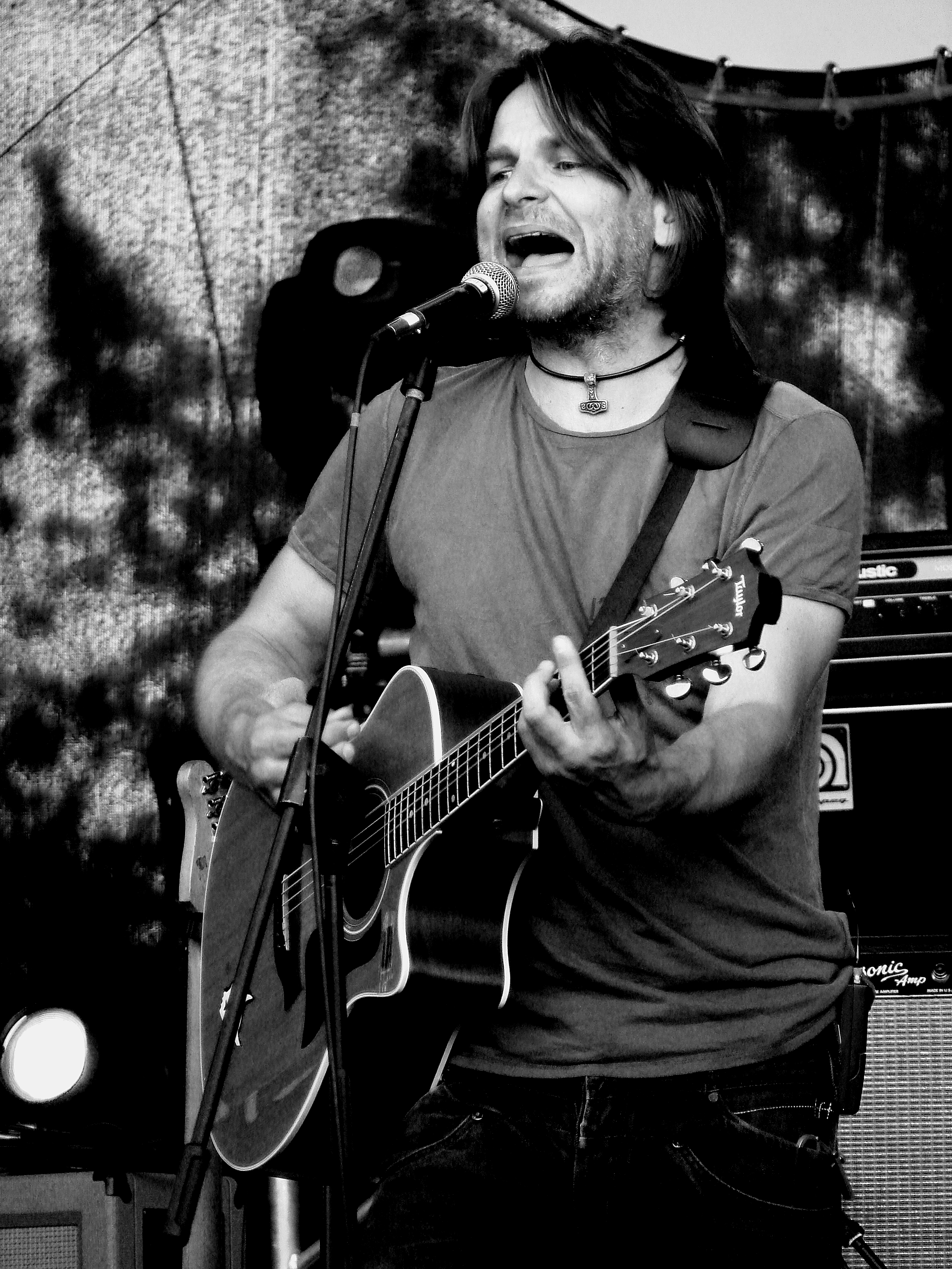 brytyjski muzyk